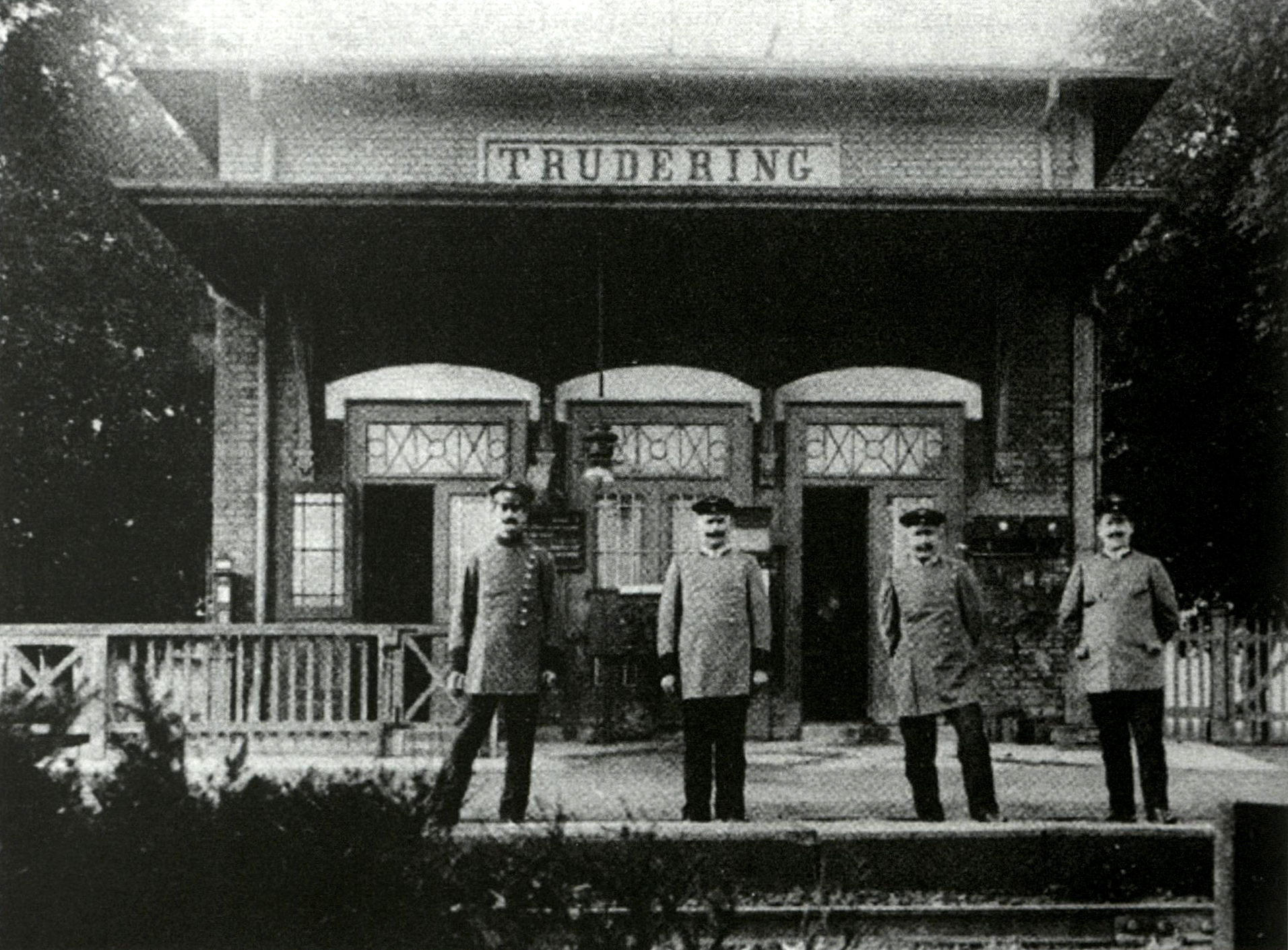 Empfangsgebäude des Bahnhofs Trudering von der Gleisseite, mit Stationspersonal